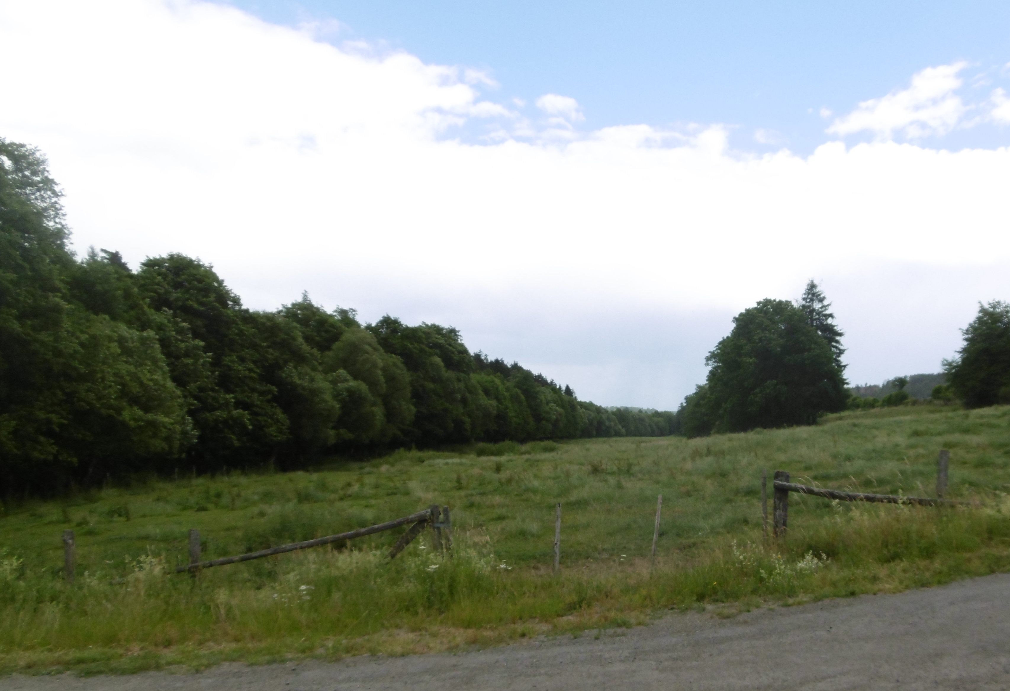 Naturschutzgebiet Gelängebachtal​ südlich Weg nach Medebach; bei linken Baubestand verläuft der Bach.